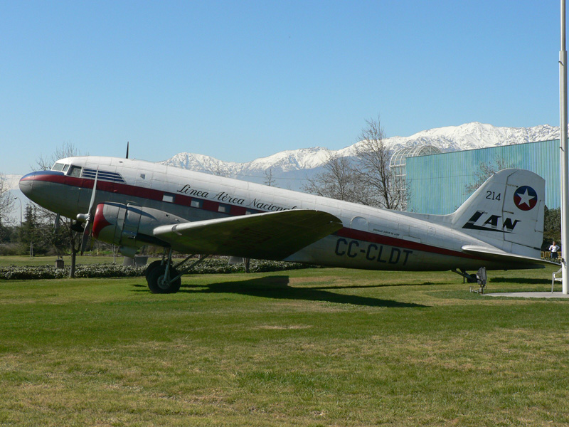 La apertura de vuelos internacionales fue posible gracias a la incorporación de aviones Douglas DC-3 a comienzos de 1946. (Foto y autorización de difusión: Museo Nacional Aeronáutico y del Espacio, Chile)